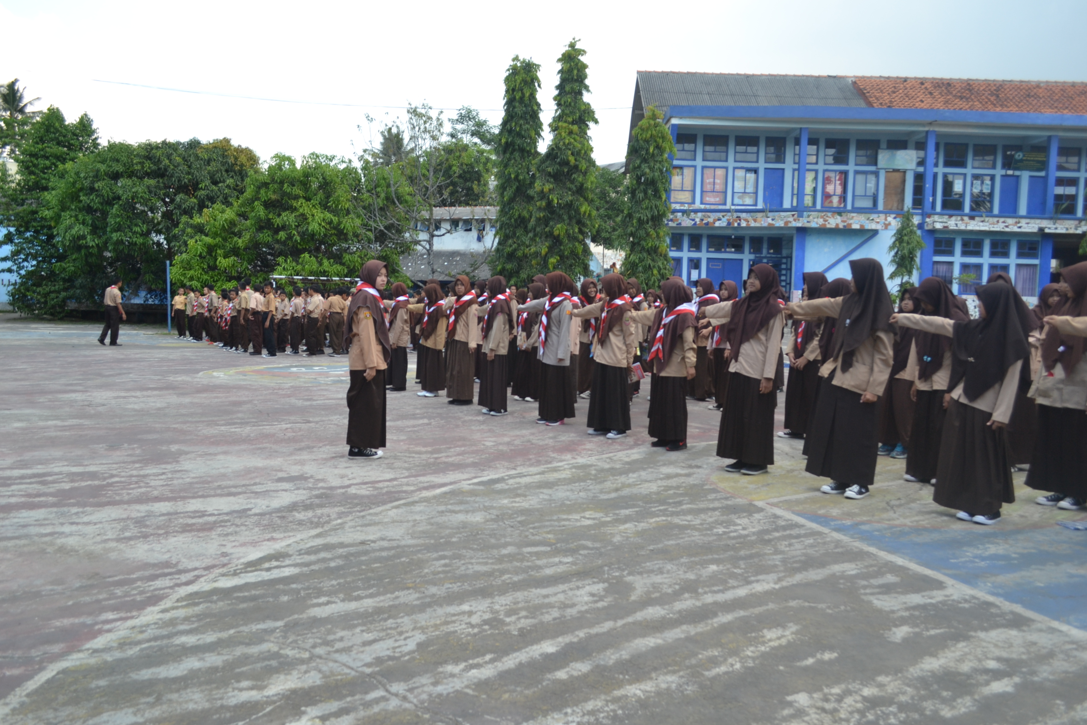 Pramuka Ainurrafiq